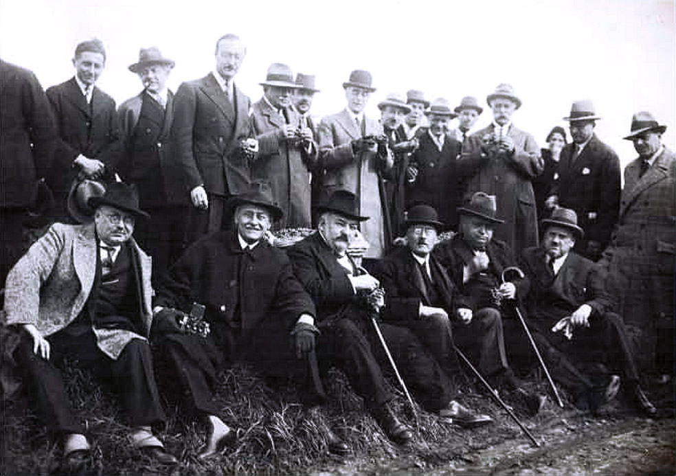 les académiciens fondateurs (normalement 25) de l'académie des gastronomes